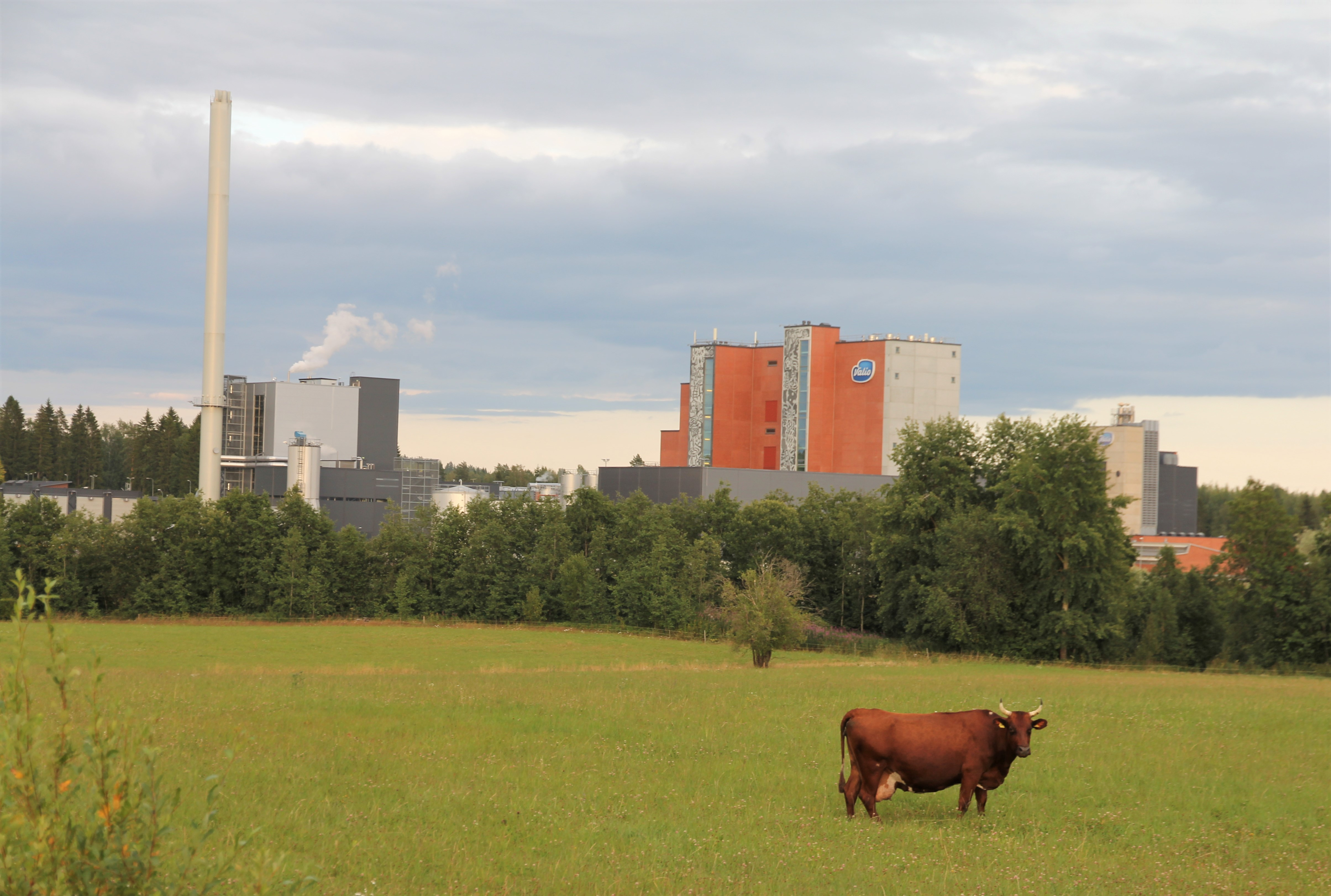 Osuuskunta ItäMaidon ja Valio Oy Lapinlahden tuotantolaitoksia Lapinlahdella elokuussa 2019. ItäMaidon ja Valio Oy Lapinlahden tehtaiden osoite on Tehtaantie 5, Lapinlahti.